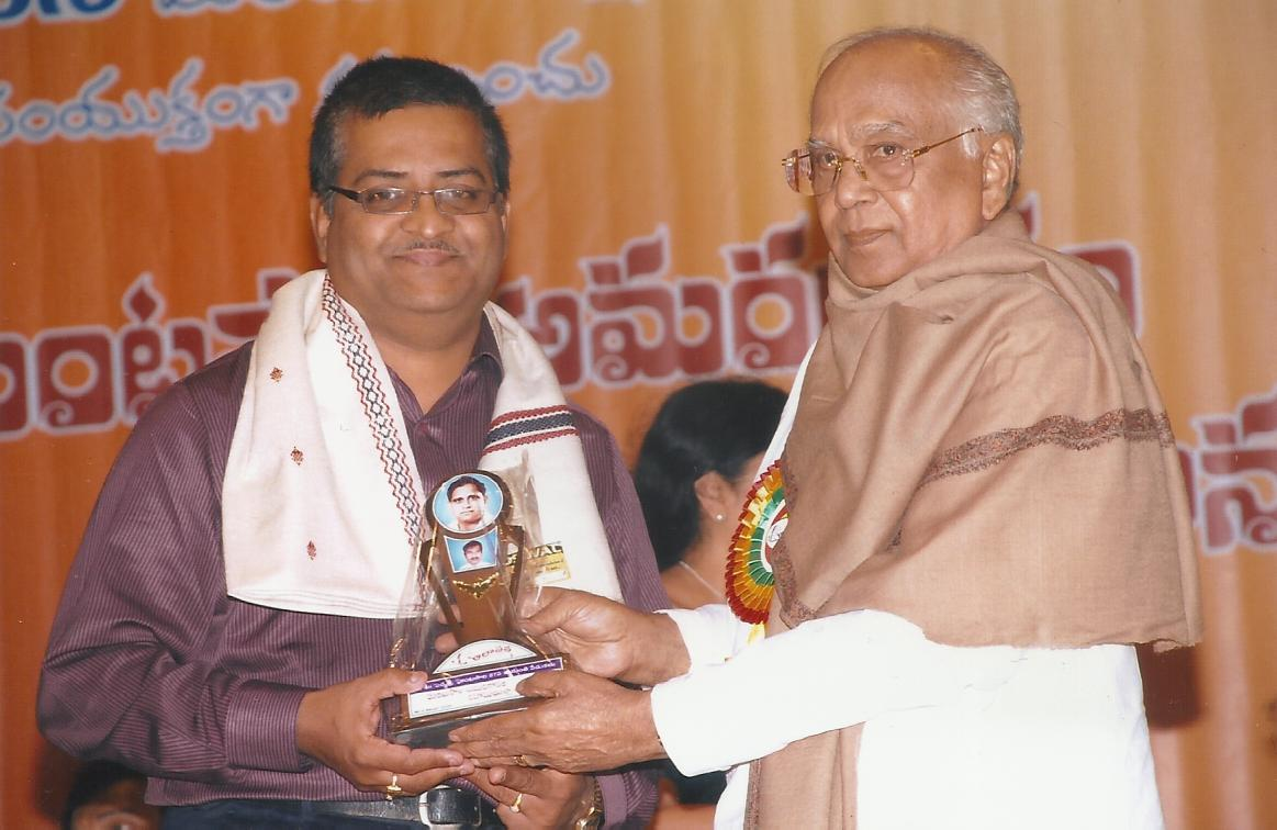 రవీంద్ర భారతి హైదరాబాదులో